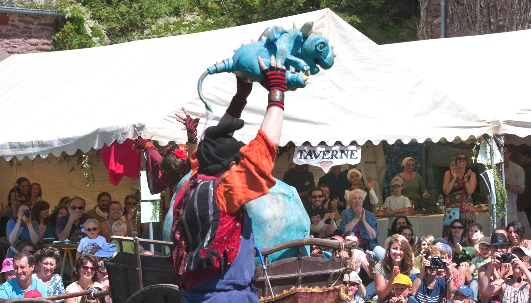 Représentation de la Compagnie du Lysandore au château de Comper, lors des 8èmes Rencontres de l'Imaginaire en 2012.